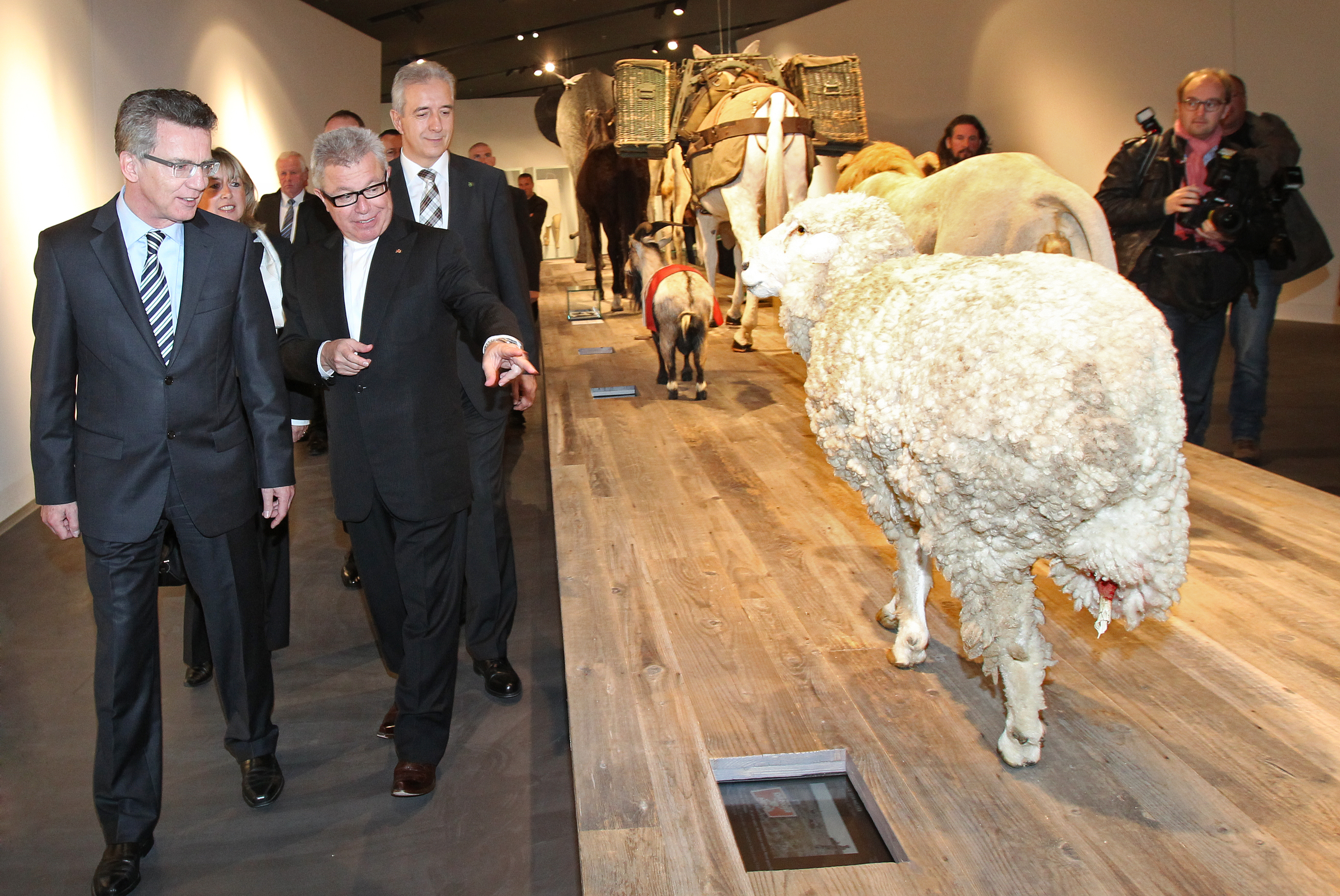 Nach einer siebenjährigen Umbauzeit wird das Militärhistorische Museum der Bundeswehr in Dresden am 14. Oktober 2011 neu eröffnet. Das Museum ist mit über 10500 in der Dauerausstellung gezeigten Exponaten auf 19.000 Quadratmetern Ausstellungsfläche eines der größten und modernsten militärhistorischen Museen Europas. Im Bild: Der Bundesminister der Verteidigung, Dr.Thomas de Maizière und der Architekt Daniel Libeskind besichtigen beim Rundgang durch das Museum auch den Themapacour "Tiere beim Militär".Das Schaf zum Beispiel wurde von den Menschen zur Minenbeseitigung eingesetzt.